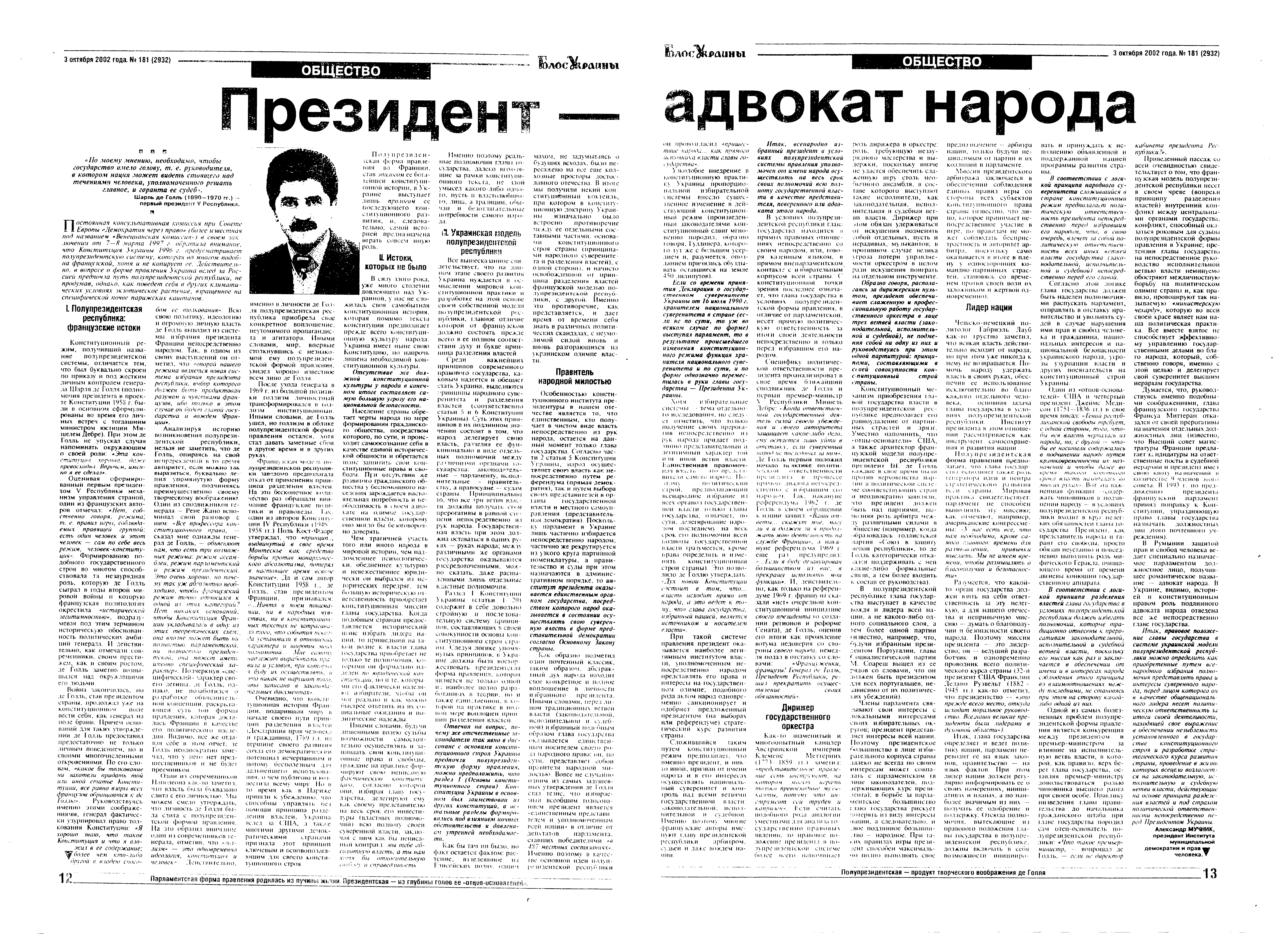 Статья А.Г. Мучника "Президент - адвокат народа".